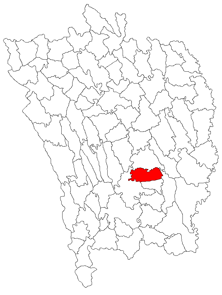 Categorie:Hărţi ale judeţului Vaslui